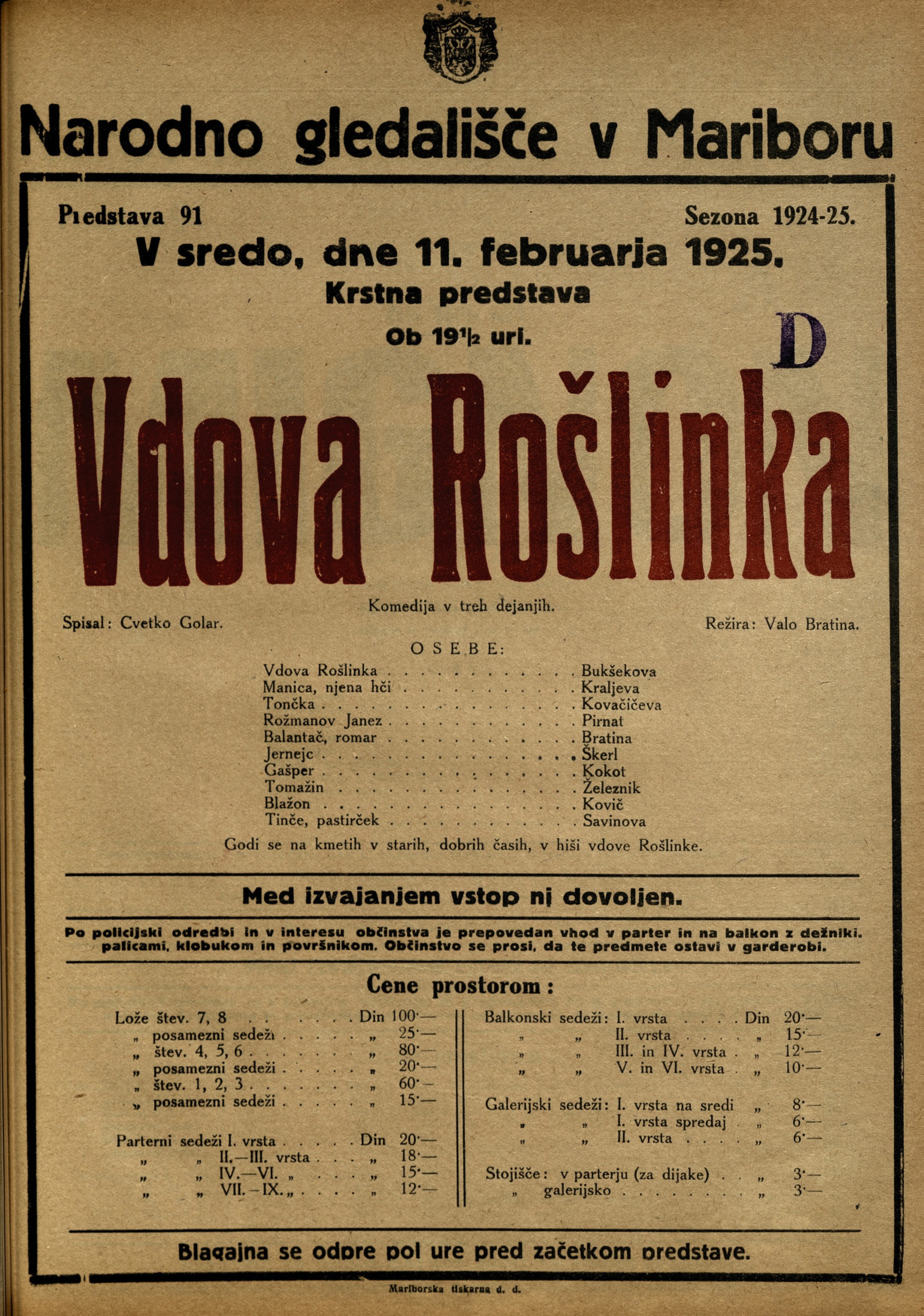 Plakat za predstavo Vdova Rošlinka v Narodnem gledališču v Mariboru.